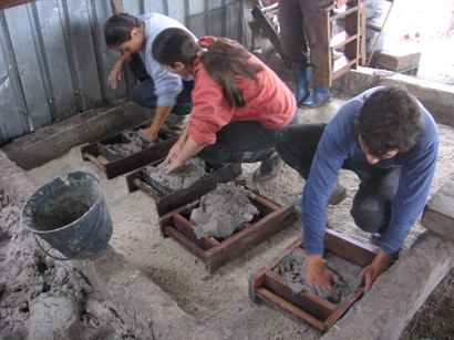 Elaboración de adobes